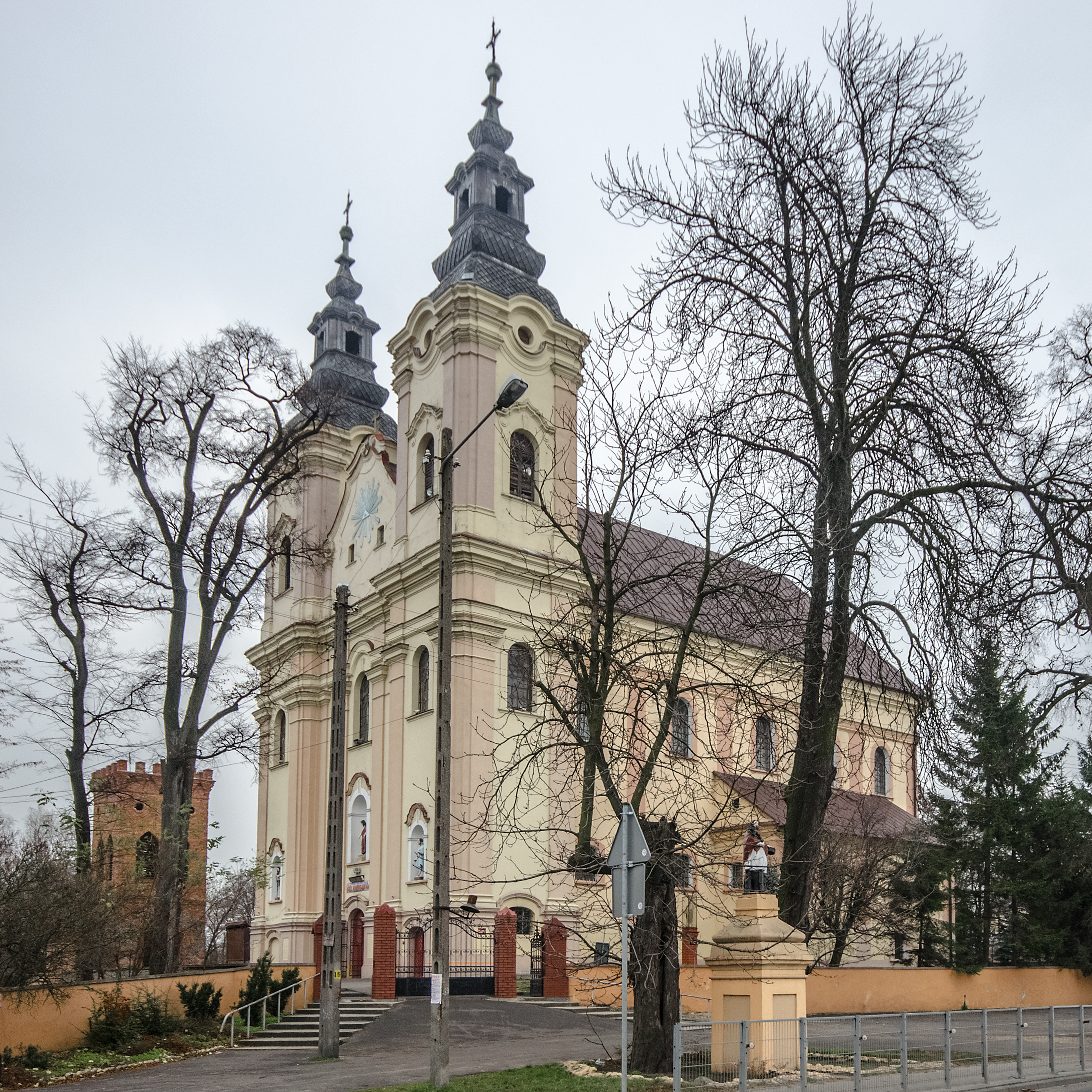 Głuchów, kościół par. p.w. św. Wacława, 1786, XIX